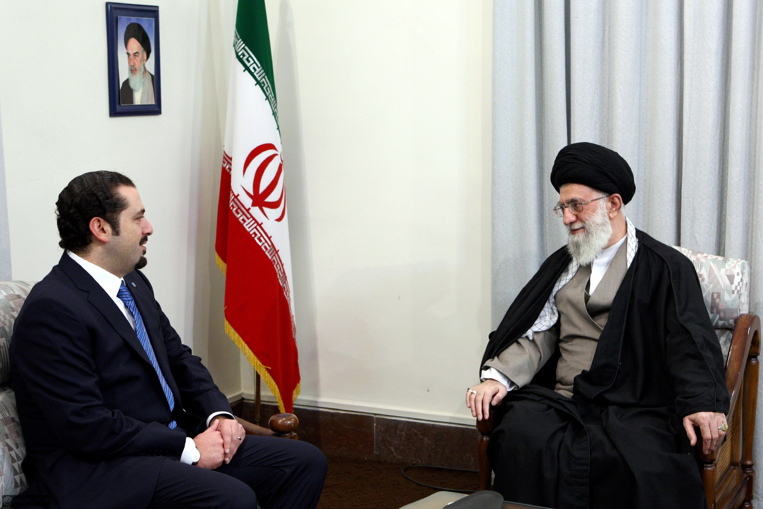 دیدار سعد حریری نخست وزیر لبنان با سید علی خامنه‌ای رهبر ایران